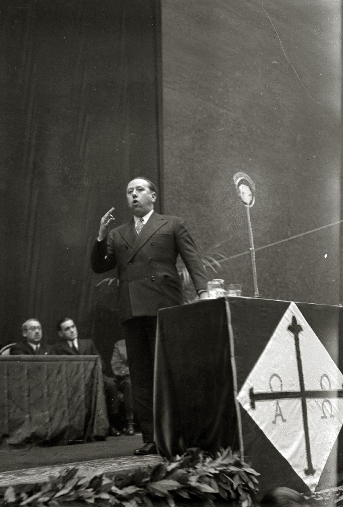 Título original: Mitin de José María Gil Robles, lider de la CEDA (Confederación Española de Derechas Autónomas), en las instalaciones de un frontón (2/7) Datos adicionales: Mitin de José María Gil Robles, líder de la CEDA, en las instalaciones de un frontón Urumea, el 24 de noviembre de 1935, durante la campaña electoral de las elecciones de febrero de 1936. Localización: San Sebastián (Guipúzcoa)